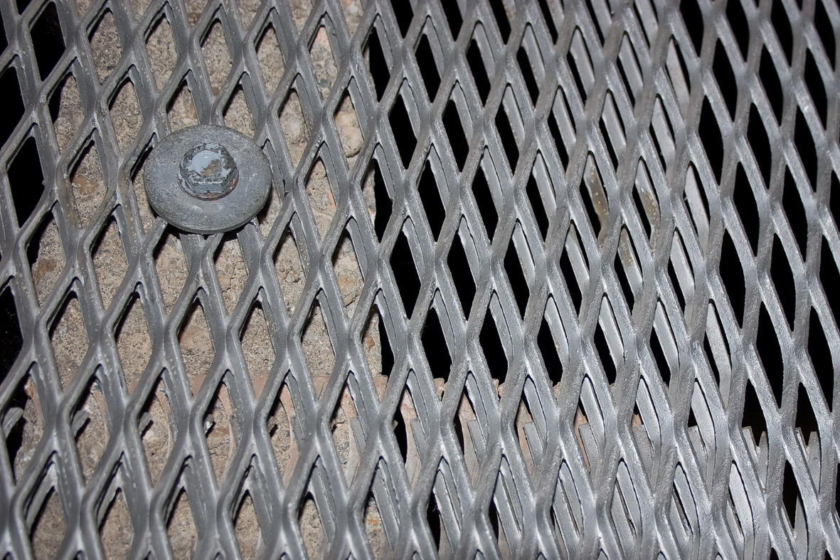 Streckmetallzaun Verwendet an der Innerdeutschen Grenze am Antifaschistischen Schutzwall.